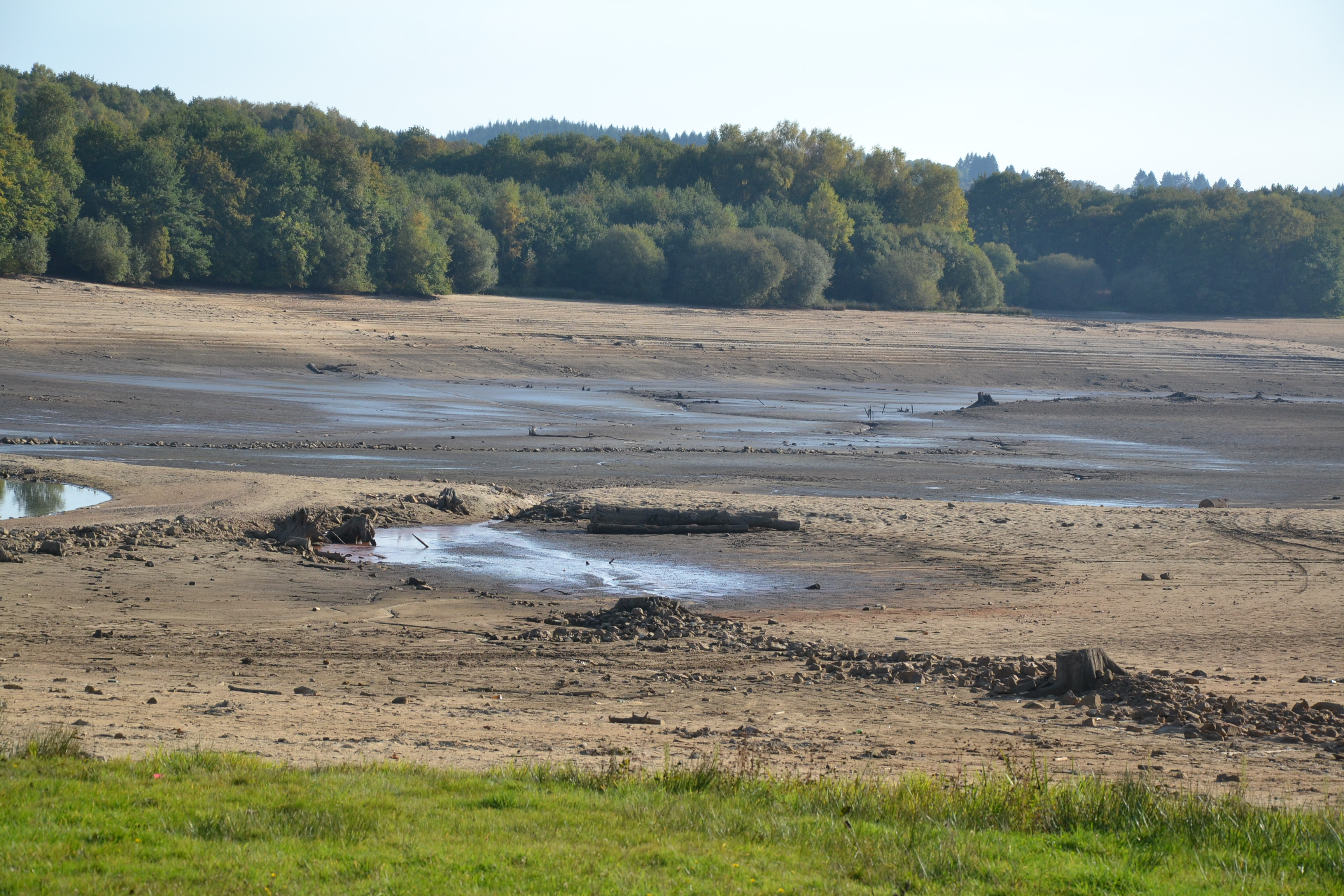 Vidange décennale du lac de Saint-Pardoux (Haute-Vienne, France).